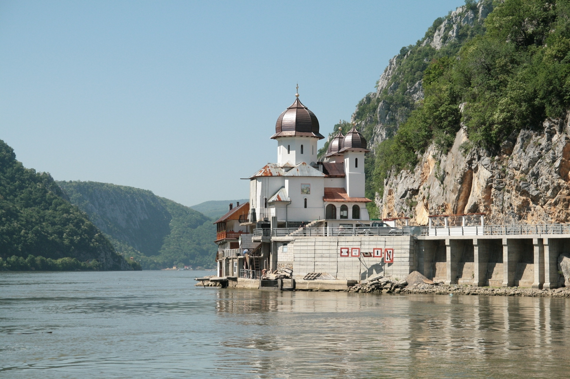 Manastirea Mraconia , Parcul Portile de Fier